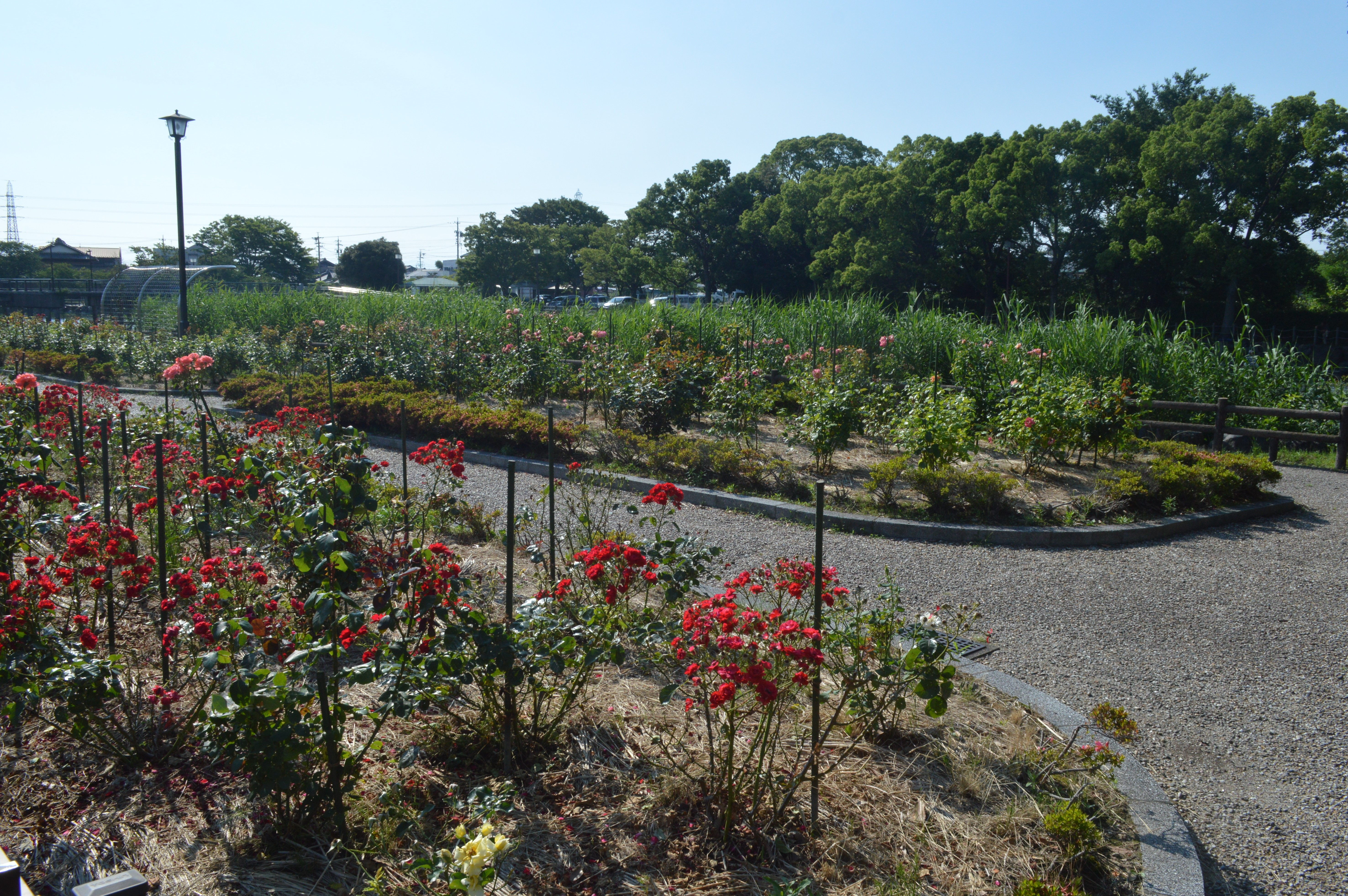 愛知県一宮市にある浅井山公園。